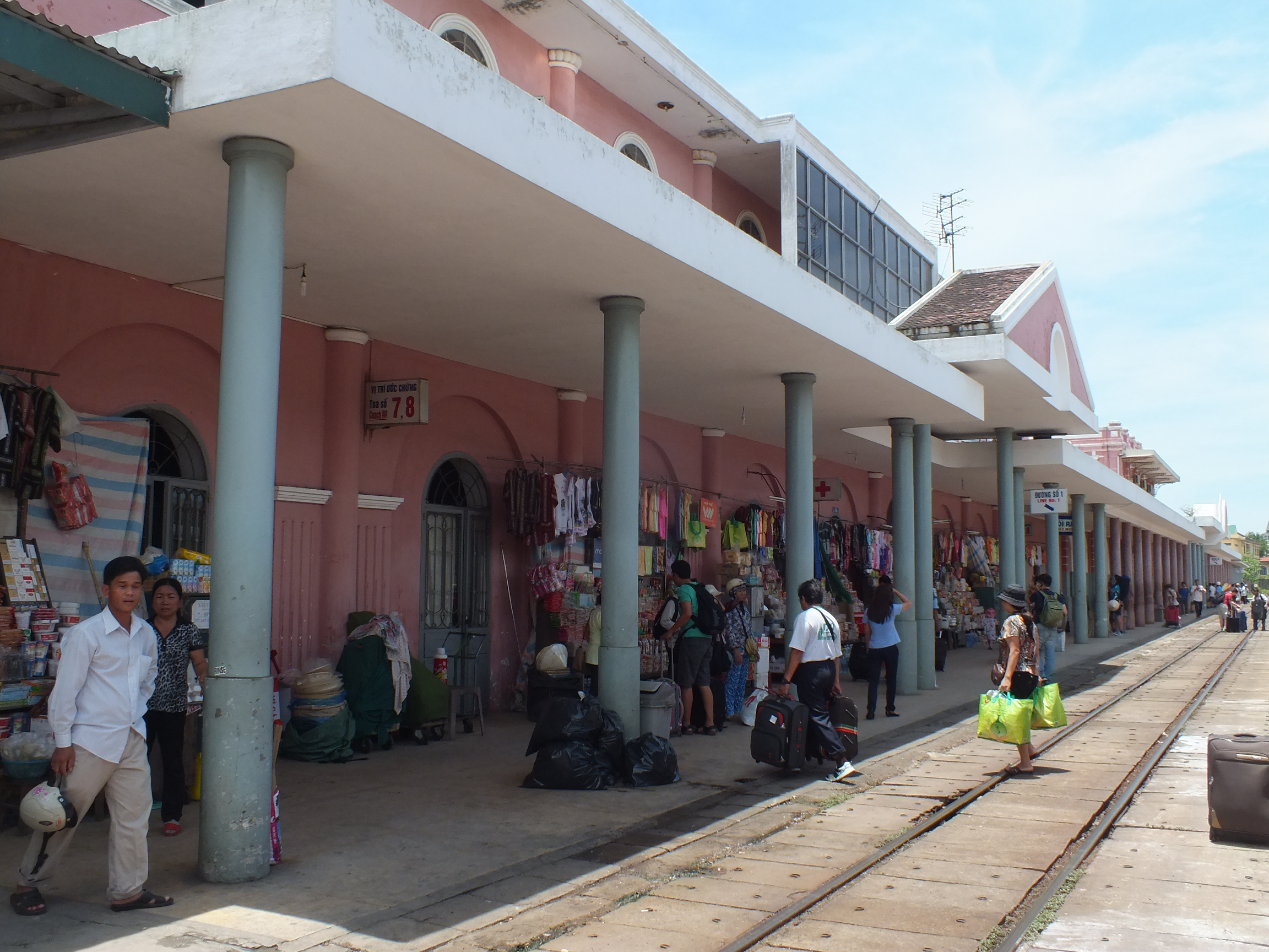 2013-07-16 Hue Railway Station,North–South Railway (Vietnam)